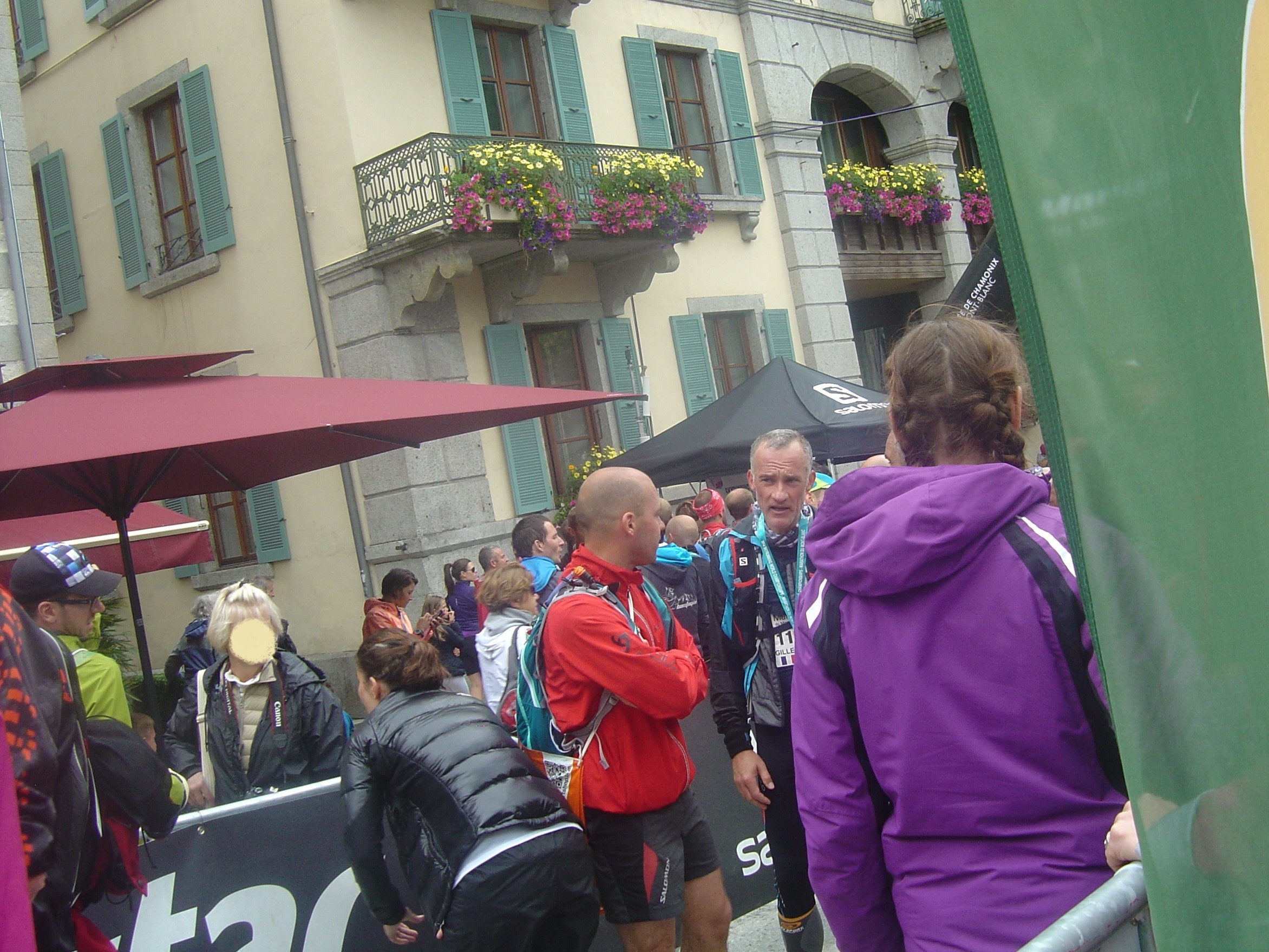 Gilles Bouleau après avoir terminé le parcours du Marathon du Mont Blanc 2014, à Chamonix (74). Sur cette édition humide de la course, il avait déclaré au micro du speaker que le jardinier avait "un peu trop arrosé".